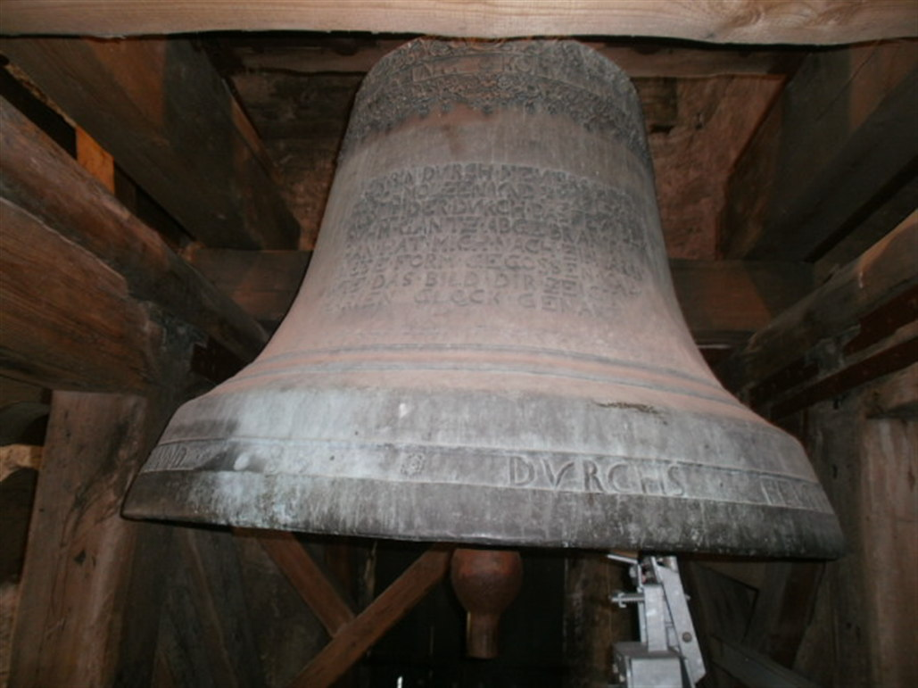 Kell ja kellamehhanism. Oktoober 2012.